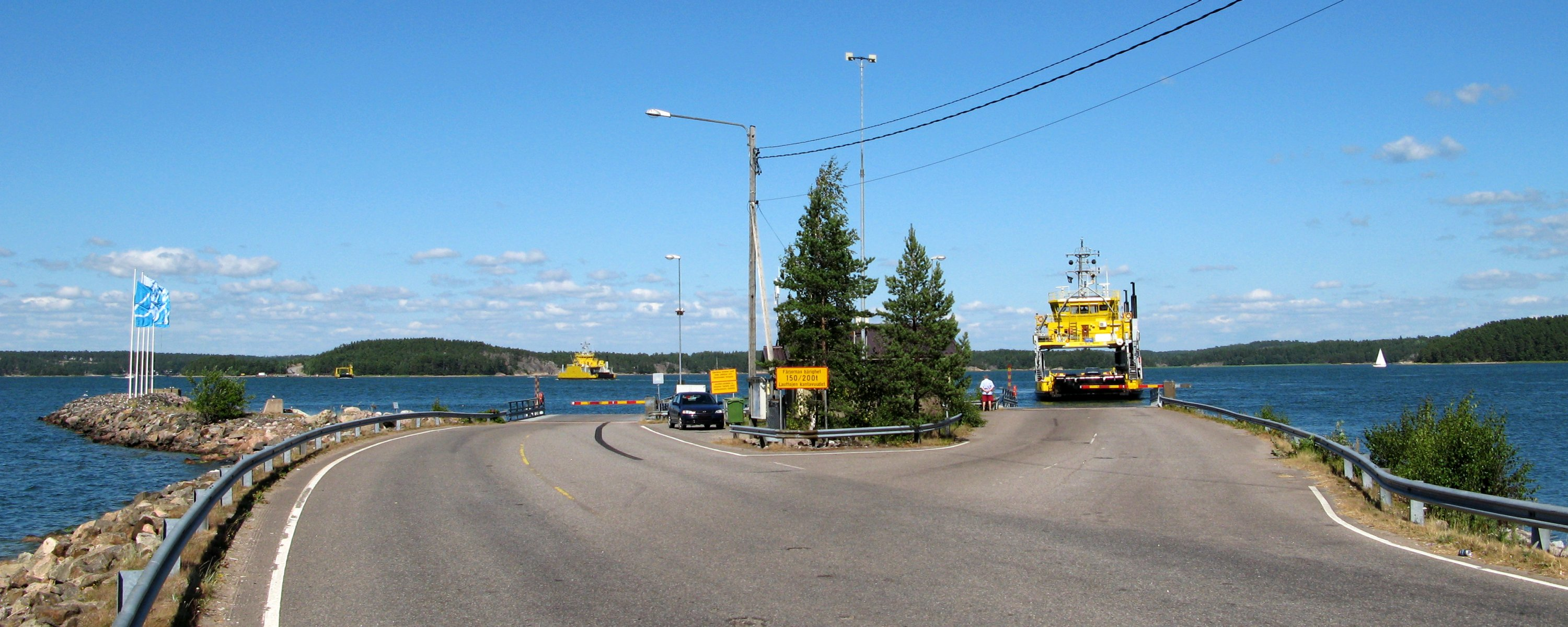 Nauvon lauttasatama Länsi-Turunmaan (nyk. Paraisten) kaupungissa kesällä 2010. Kuvassa näkyvät kaikki kolme Parainen–Nauvo-välillä liikennöivää maantielauttaa (Falco, Sterna ja Odil). Vastarannalla häämöttää Paraisten puoleinen lauttasatama.